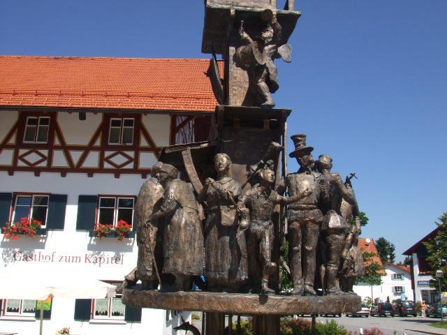 Wiggensbach, Landkreis Oberallgäu Dorfbrunnen